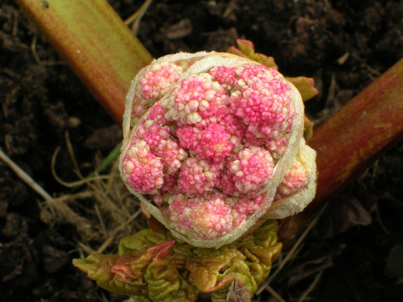 Rhubarb